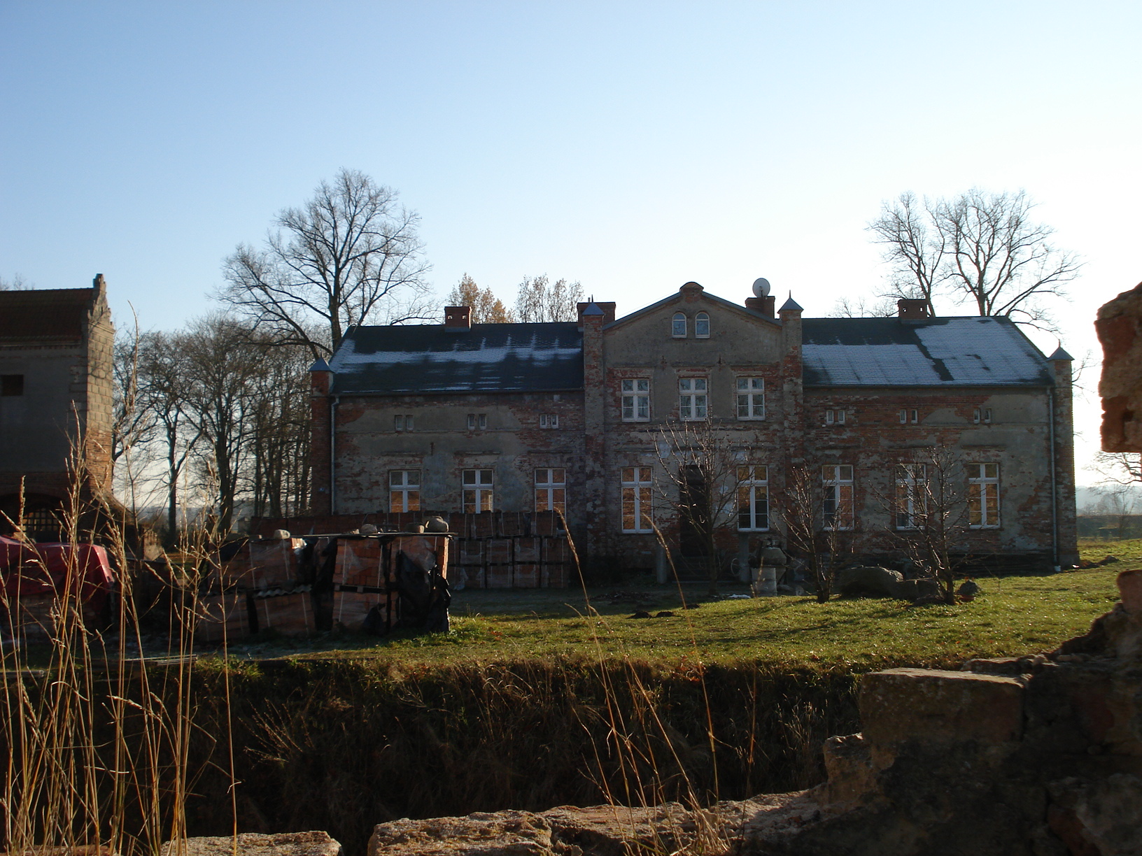 Dwór wybudowany przez Joahima Englera, widok z dziedzińca